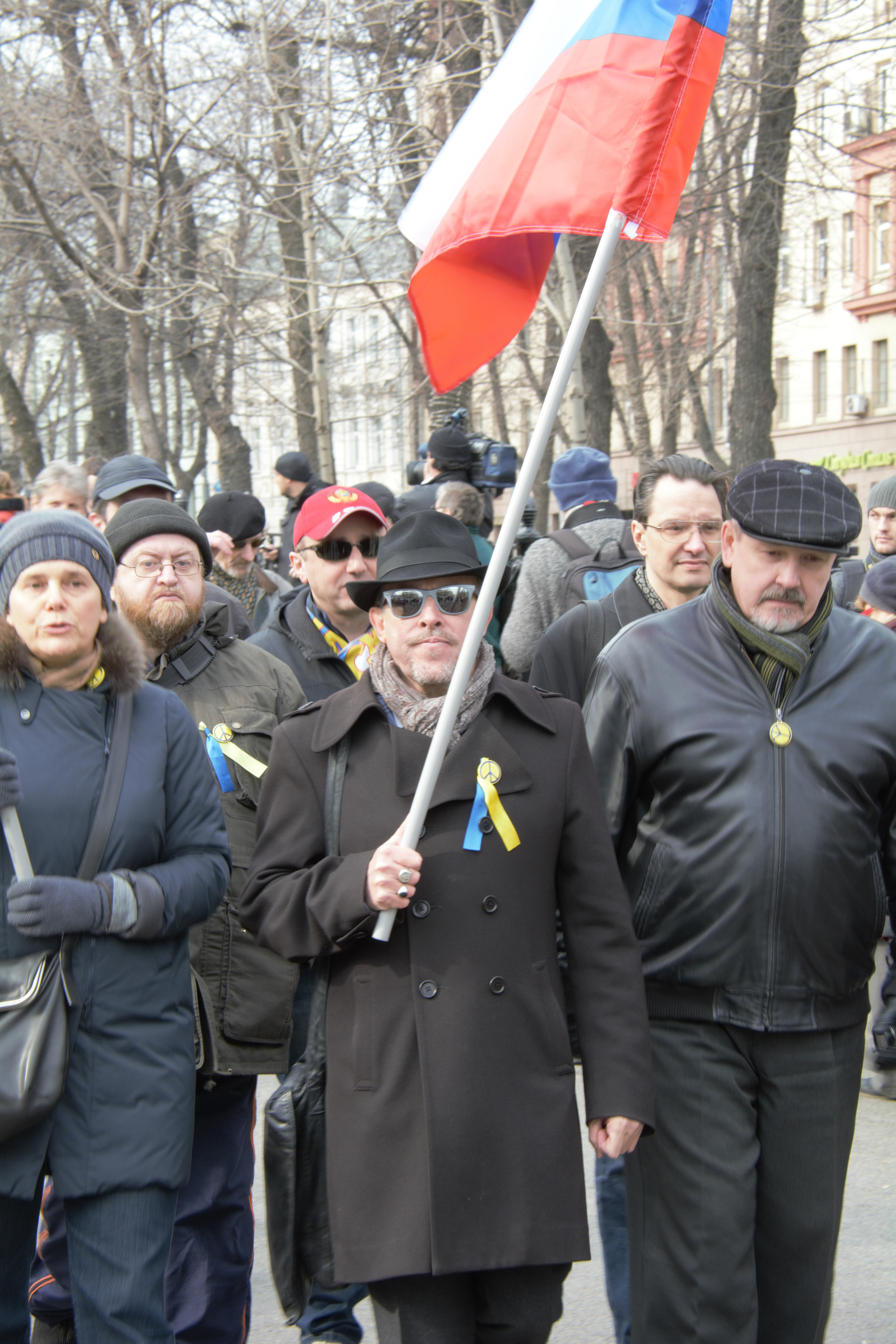 Андрей Макаревич